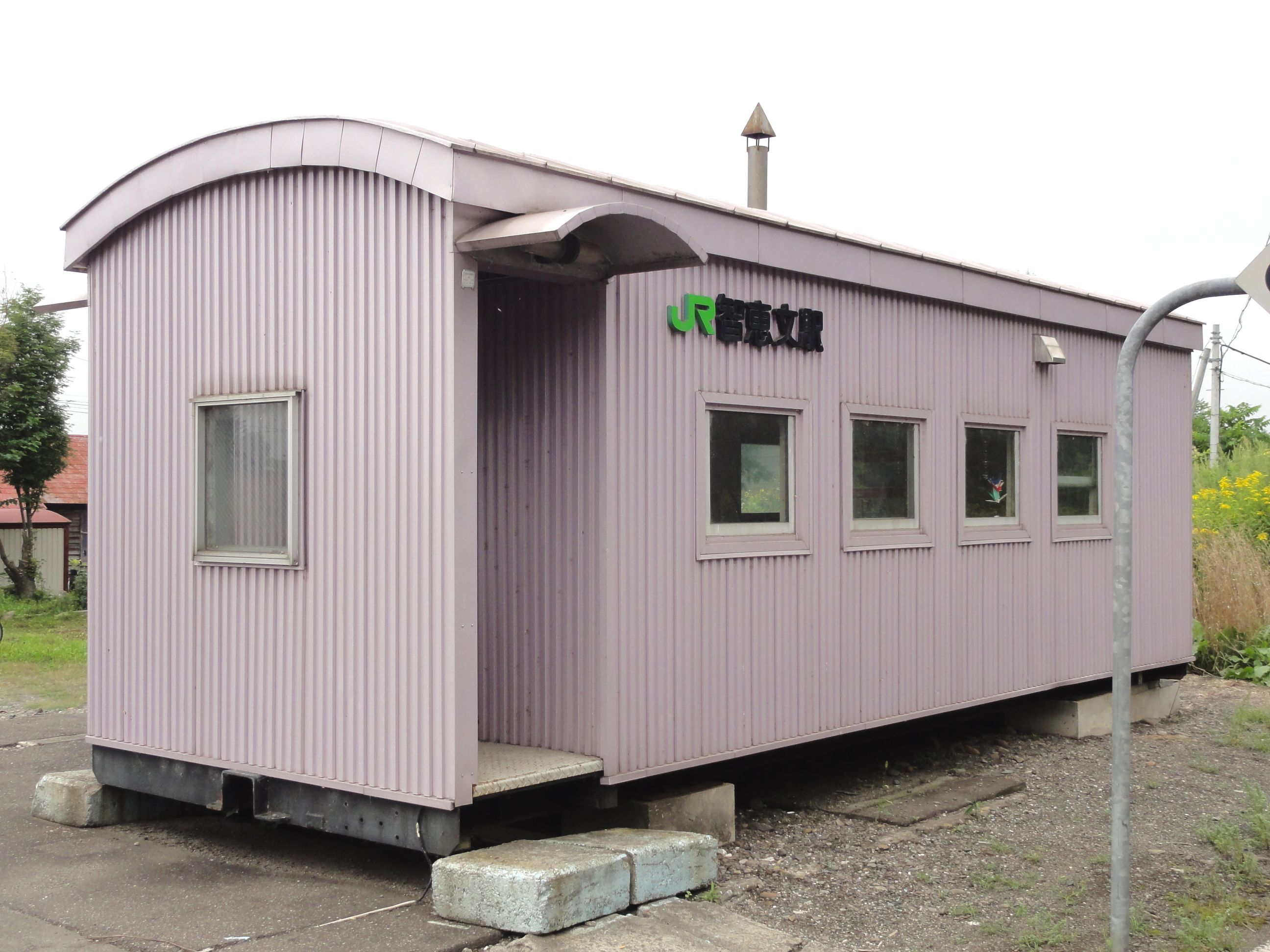 智恵文駅待合室の小屋